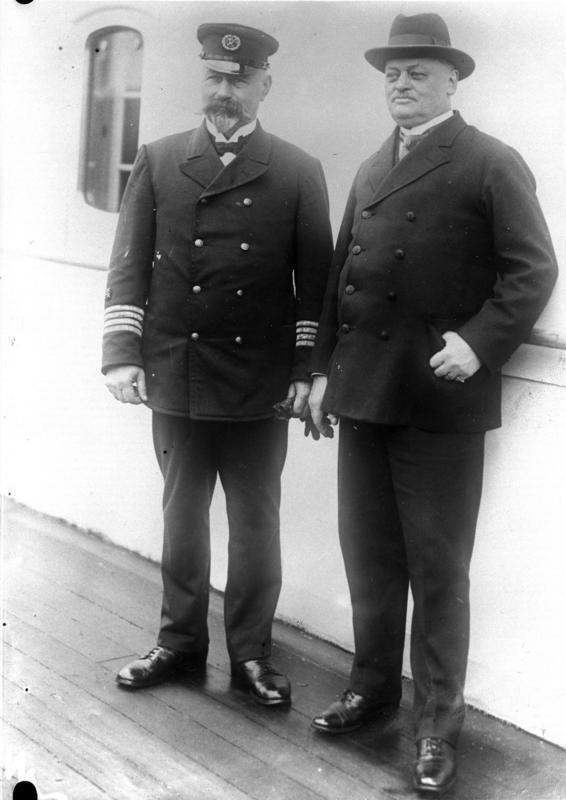 Der Kapitän des neuen deutschen Ozeanriesen "Europa" Johnsen und der Präsident des Norddeutschen Lloyd Heinecken, welche die erste Reise des neuen Ozeanriesen leiten werden. Zu der Ankunft des Lloyd Dampfers "Columbus" in Amerika. links, der Kapitän des "Columbus" Johnsen rechts, der Präsident des Norddeutschen Lloyds Heinecken. [Text nach Bild 102-00415, Mai 1924]